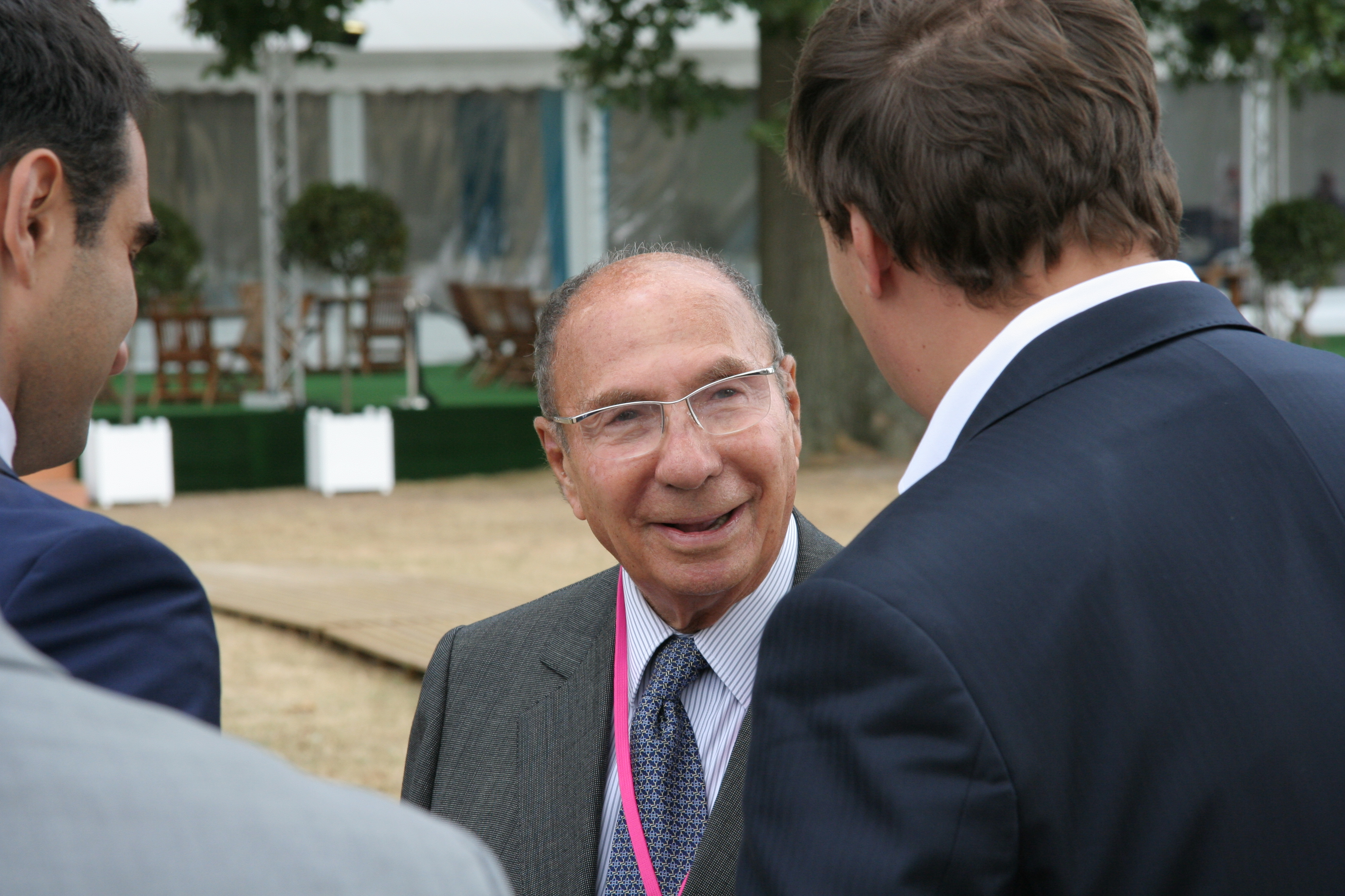 Serge Dassault en septembre 2009 à l'université d'été du MEDEF.